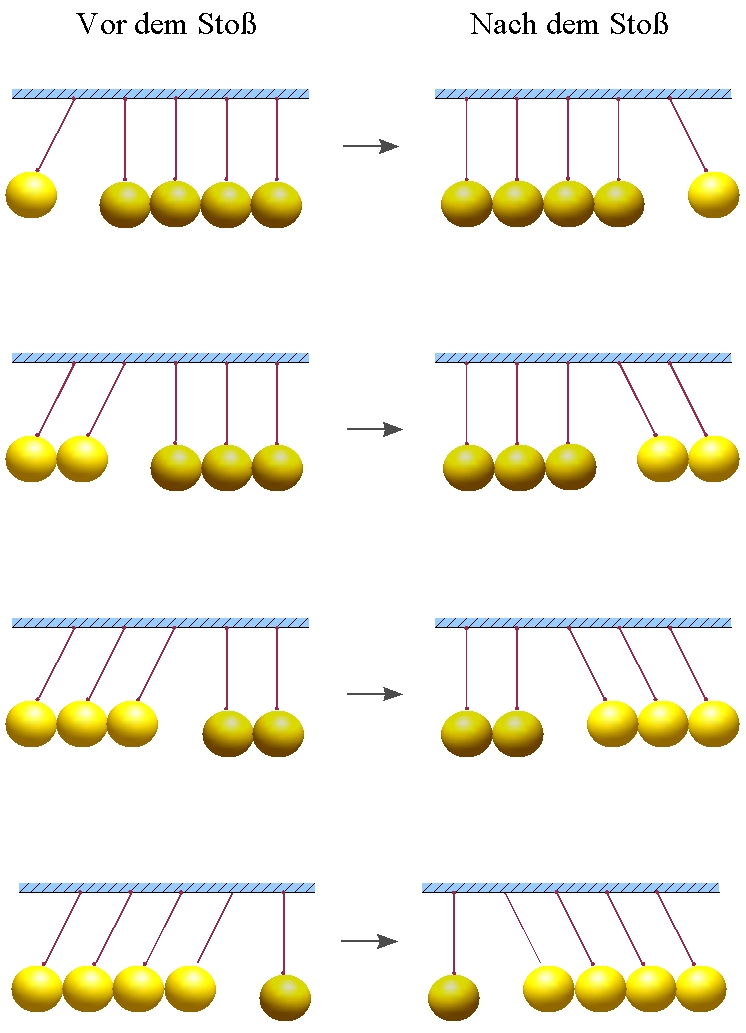 Kugelstoßpendel